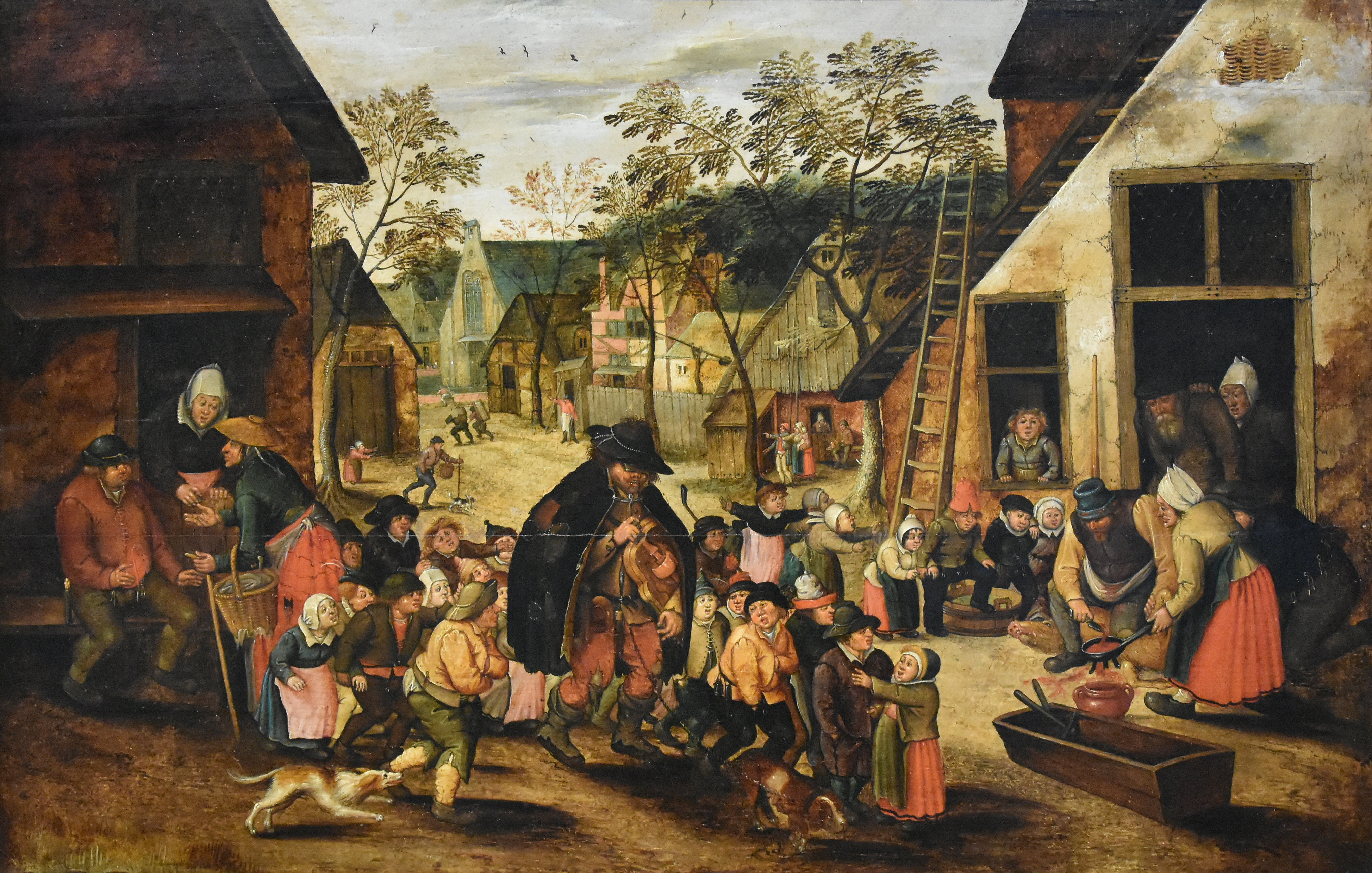 Pieter Brueghel de Jonge (1564-1638) De lierenman - Noordbrabants Museum 's-Hertogenbosch - De lierenman, hier een blinde, was een populair thema in de 16e en 17e eeuw. Links gaat de aandacht naar zijn bedelende vrouw en rechts naar een varken dat men slacht. De lierenman krijgt de aandacht van kinderen die hij in zijn ban brengt zoals een rattenvanger van Hamelen